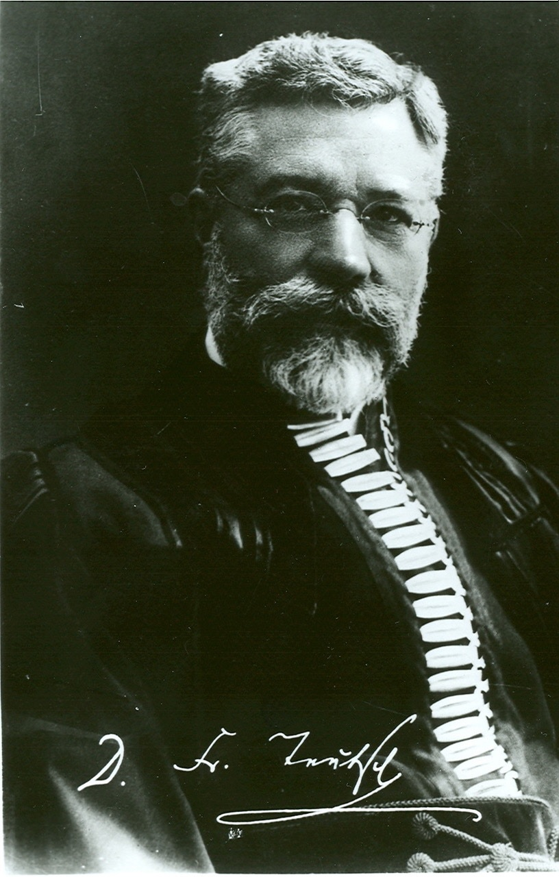 Porträtfotografie von Friedrich Teutsch